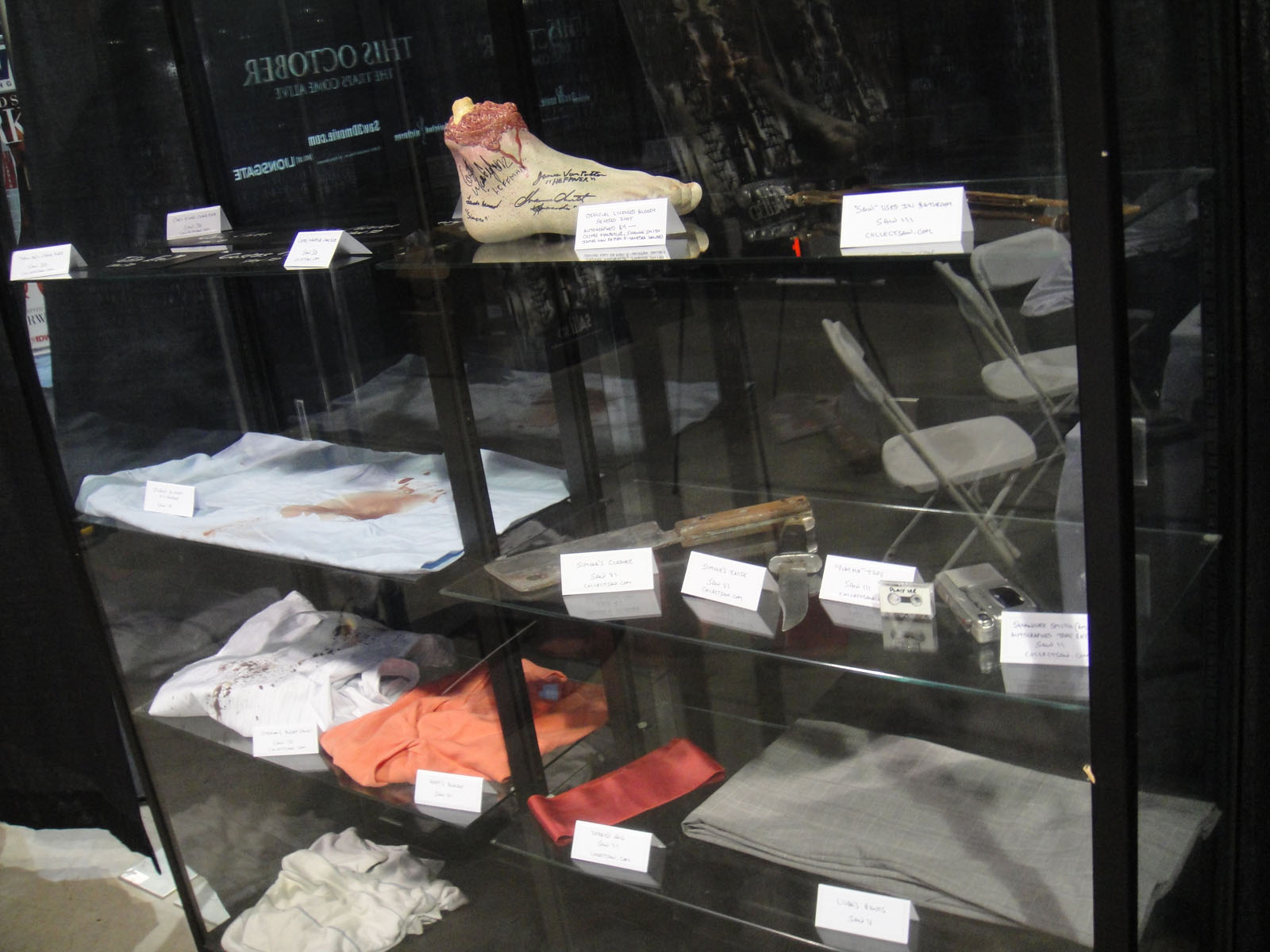 Saw movie series props